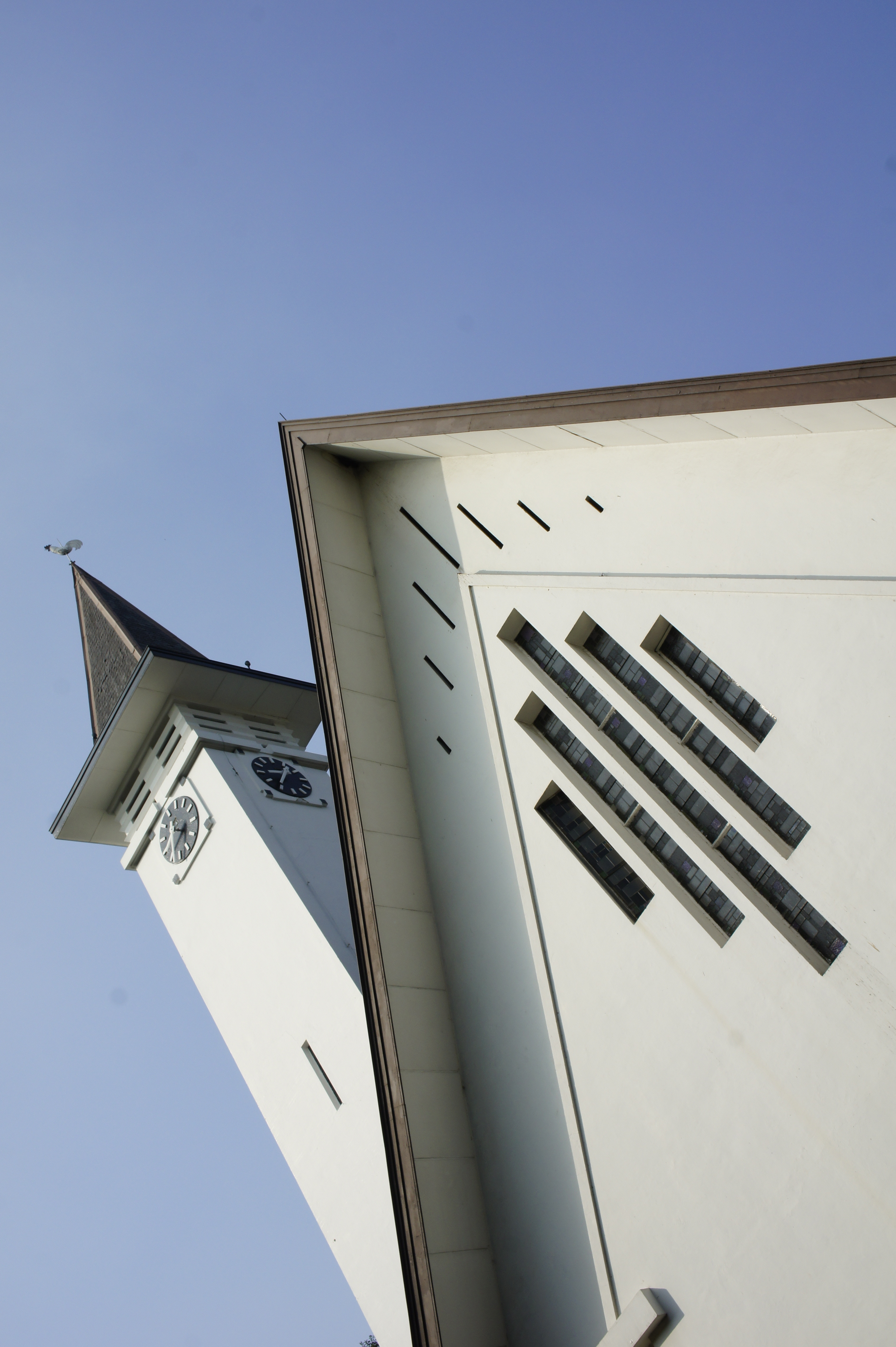 GPIB Paulus